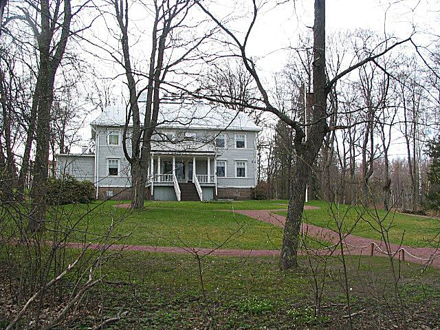 Strömsin kartanon päärakennus Roihuvuoressa Strömsinlahden ranalla. Rakennuksessa toimii nykyisin Helsingin kuvataidekoulu.